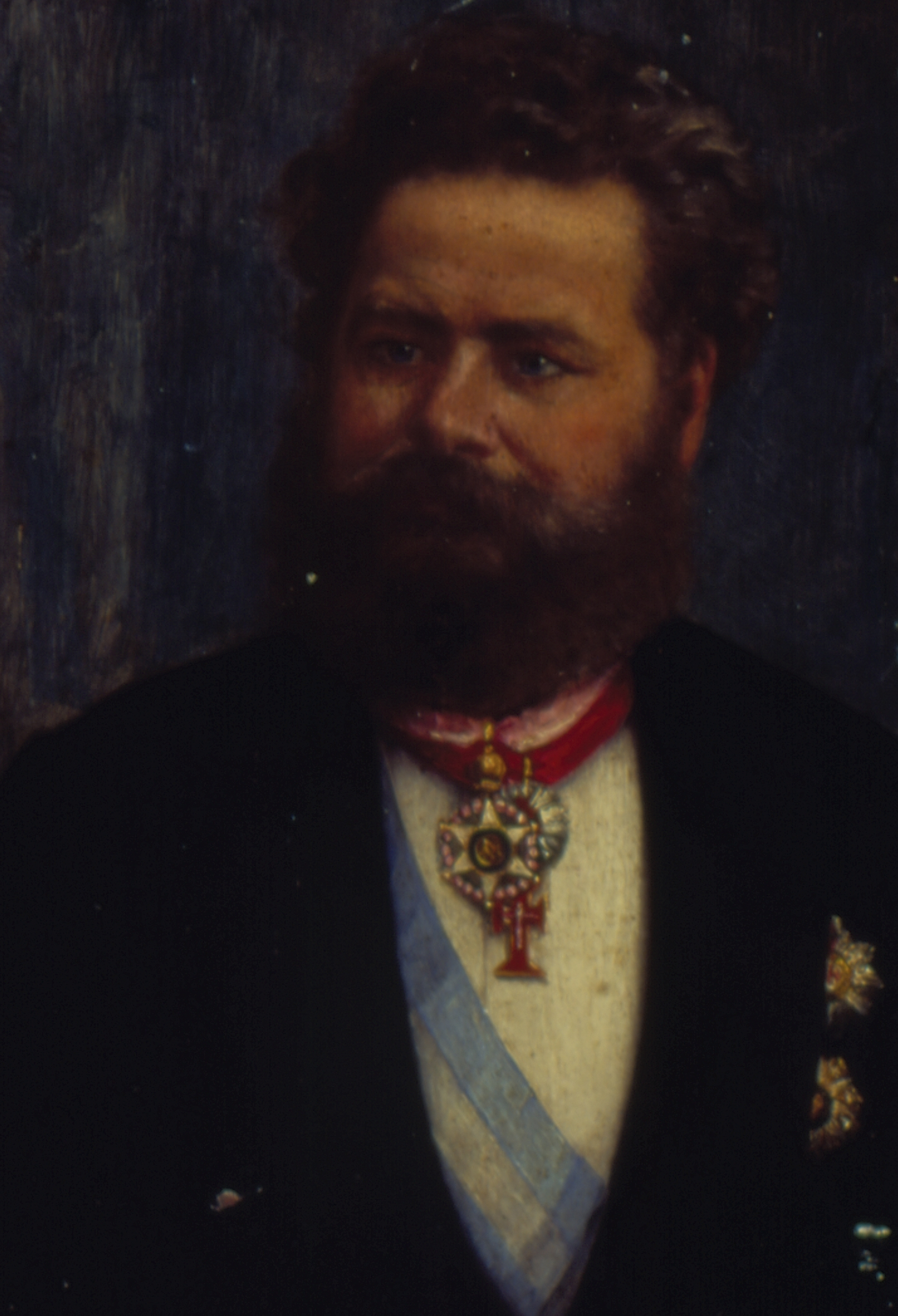 Obra que integra o acervo do Museu Paulista da USP.